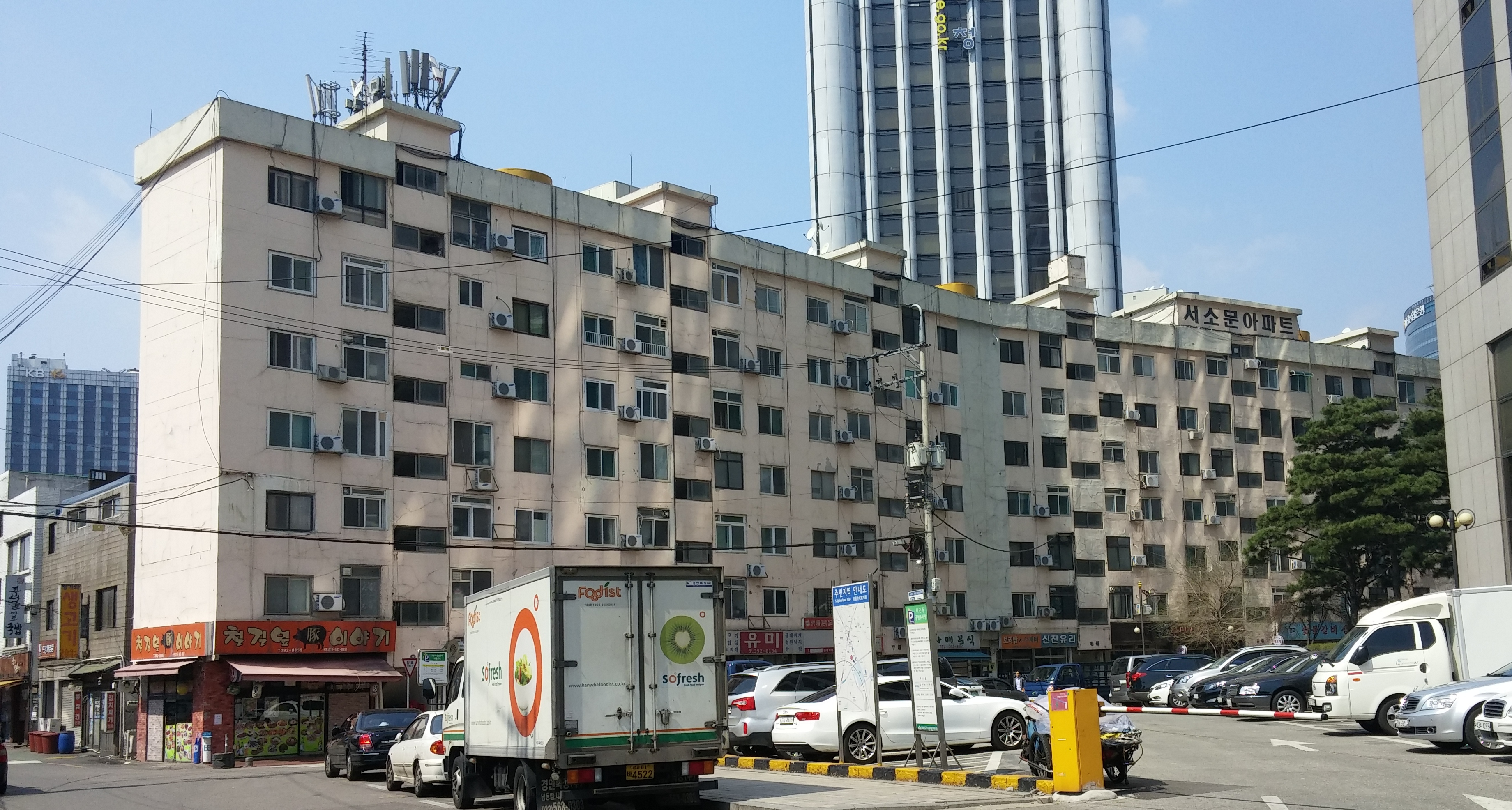 1971년에 건축된 서소문아파트. 서울 서대문구 통일로 59